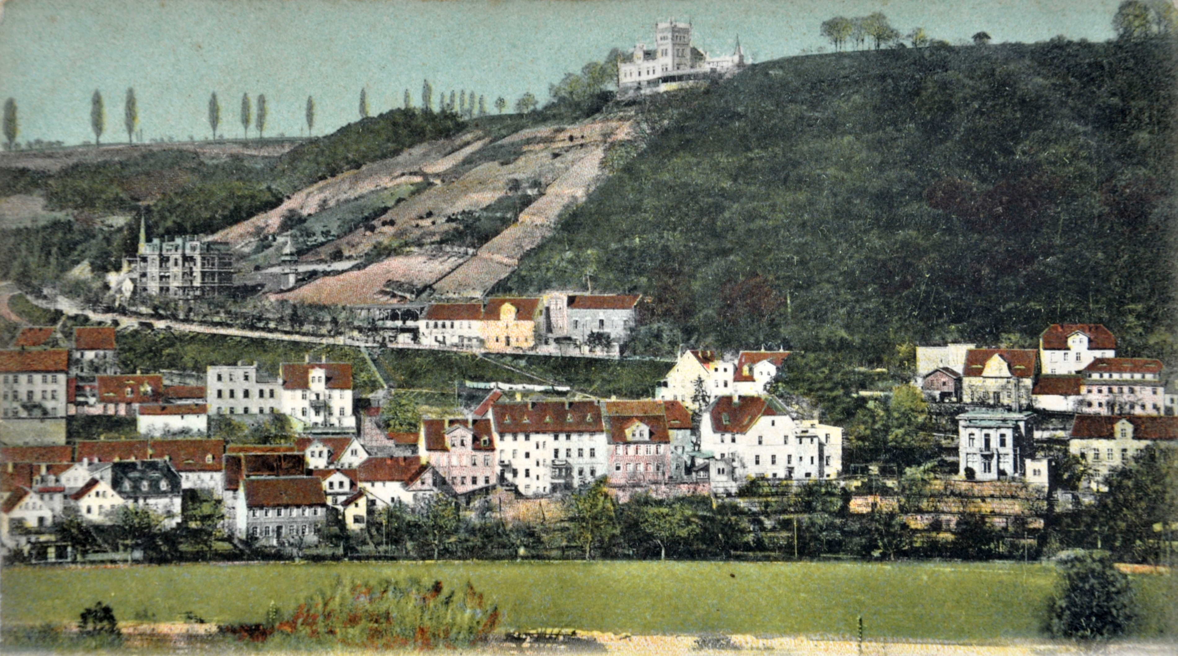 Berghotel Wilhelmsburg in Bad Kösen. Blick auf das Hotel vom Gradierwerk aus (um 1900). Der Berg ist noch ohne den heute (im Jahr 2010) vorhandenen Wald.